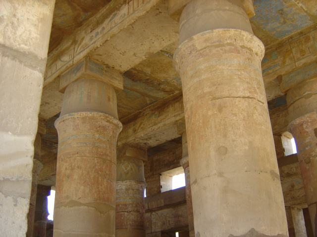 Isis tempel in Karnak Eigen foto januari 2007 Karnak Ben Pirard, GFDL